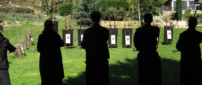 Les Sarbacanakas face aux cibles du Zen-Dojo-Sarbacana